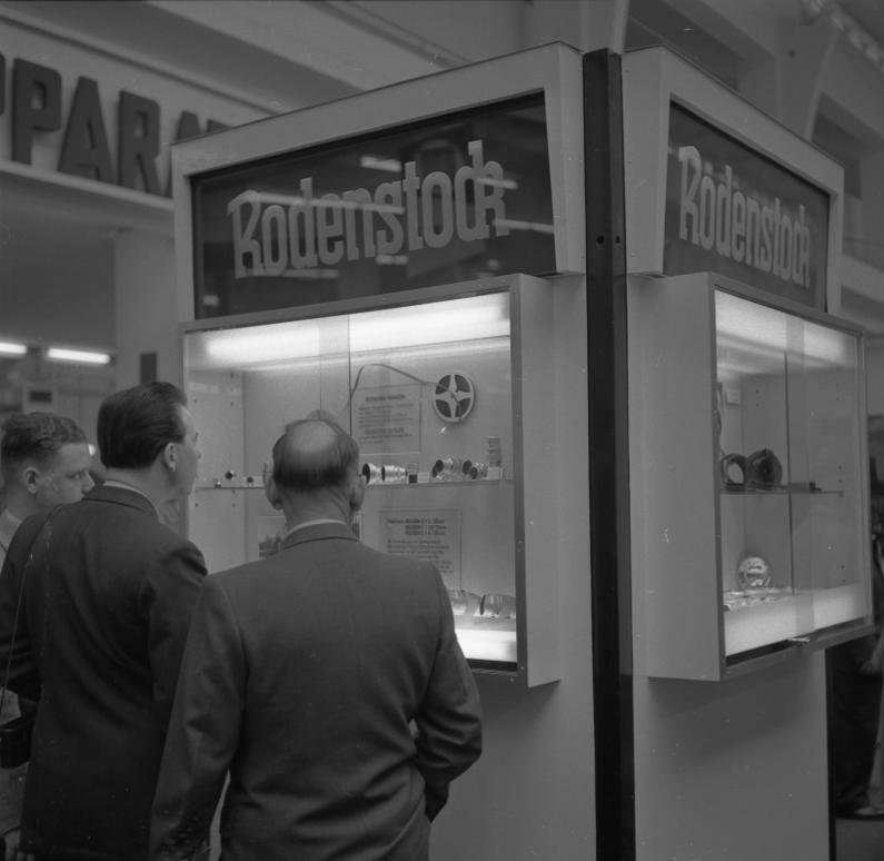 Photokina Köln